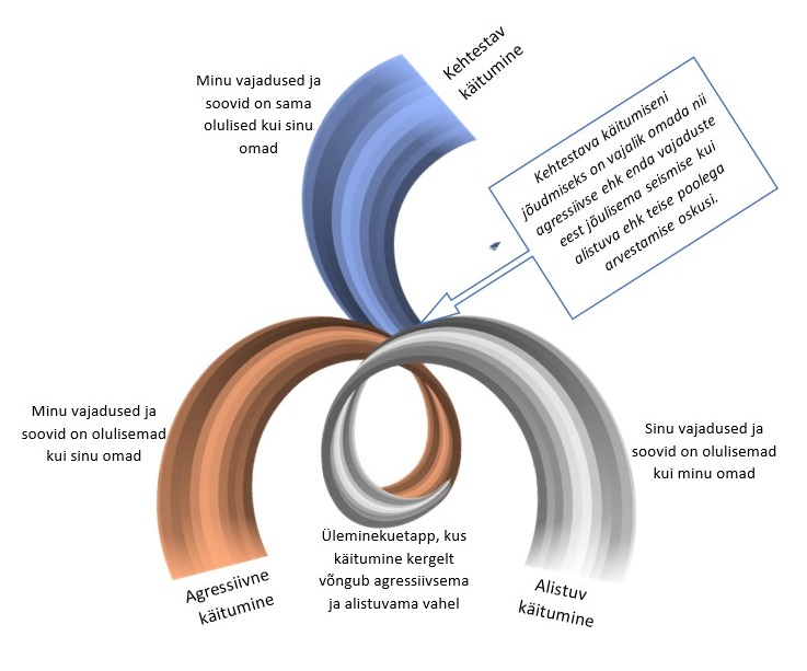 Kolme käitumisiviisi olemus ja liikumine (areng) suhtlemisel nende vahel.